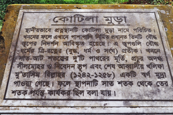 স্থানীয়ভাবে প্রত্নস্থানটি কোটিলা মুড়া নামে পরিচিত। খননের ফলে এখানে পাশাপাশি নির্মিত প্রধান তিনটি বৌদ্ধ স্তূপের নিদর্শন আবিস্কৃত হয়েছে। এ স্তূপগুলি বৌদ্ধ ধর্মের ত্রি-রত্নের (বুদ্ধ, ধর্ম ও সংঘ) প্রতীক। খননে সাত-আট শতকের দু'টি পাথরের মূর্তি, প্রচুর অদগ্ধ সীলমোহর ও নিবেদন স্তূপ এবং শেষ আব্বাসীয় খলিফা মু'তাসিম বিল্লাহর (১২৮২ - ১২৫৮) একটি স্বর্ণ মুদ্রা পাওয়া গিয়েছে। ফলে স্থাপনাটি সাত শতক থেকে তের শতক পর্যন্ত কার্যকর ছিল বলা যায়।